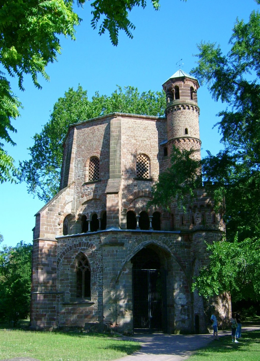 Alter Turm bei Villeroy & Boch in Mettlach